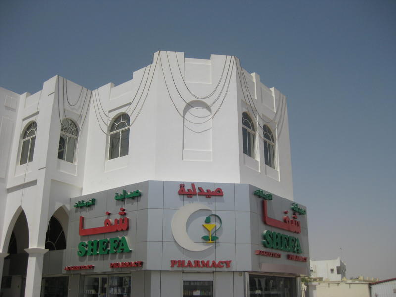 صيدلية شفا الخريطيات